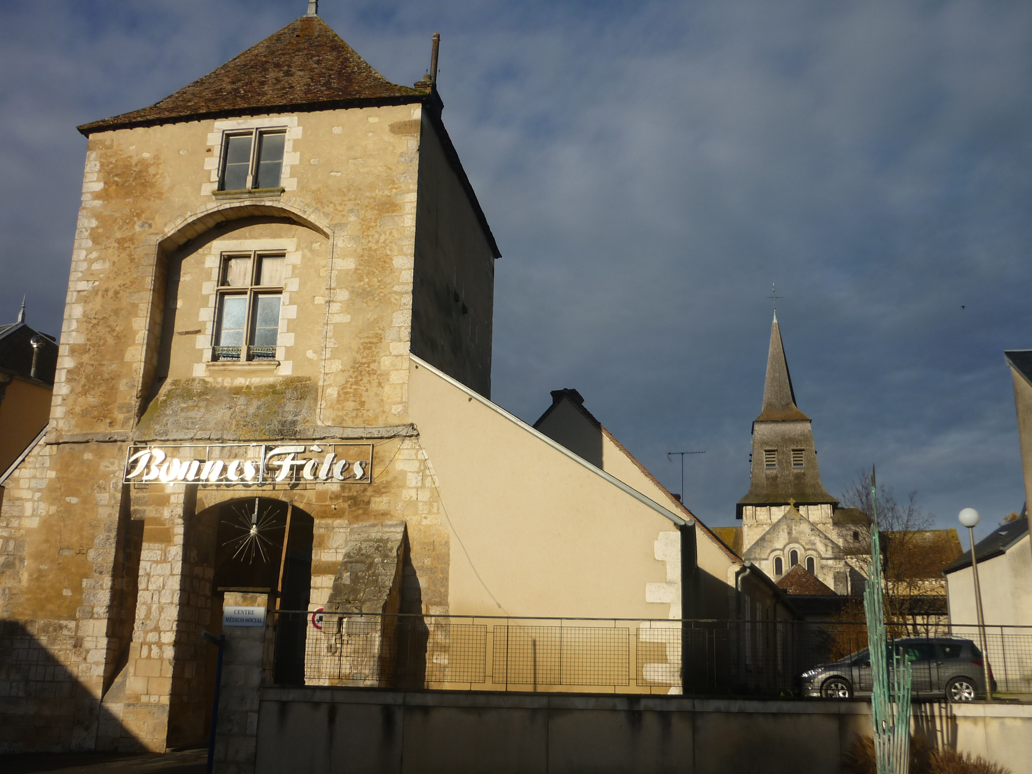 Collégiale Saint-Germain des Aix-d'Angillon